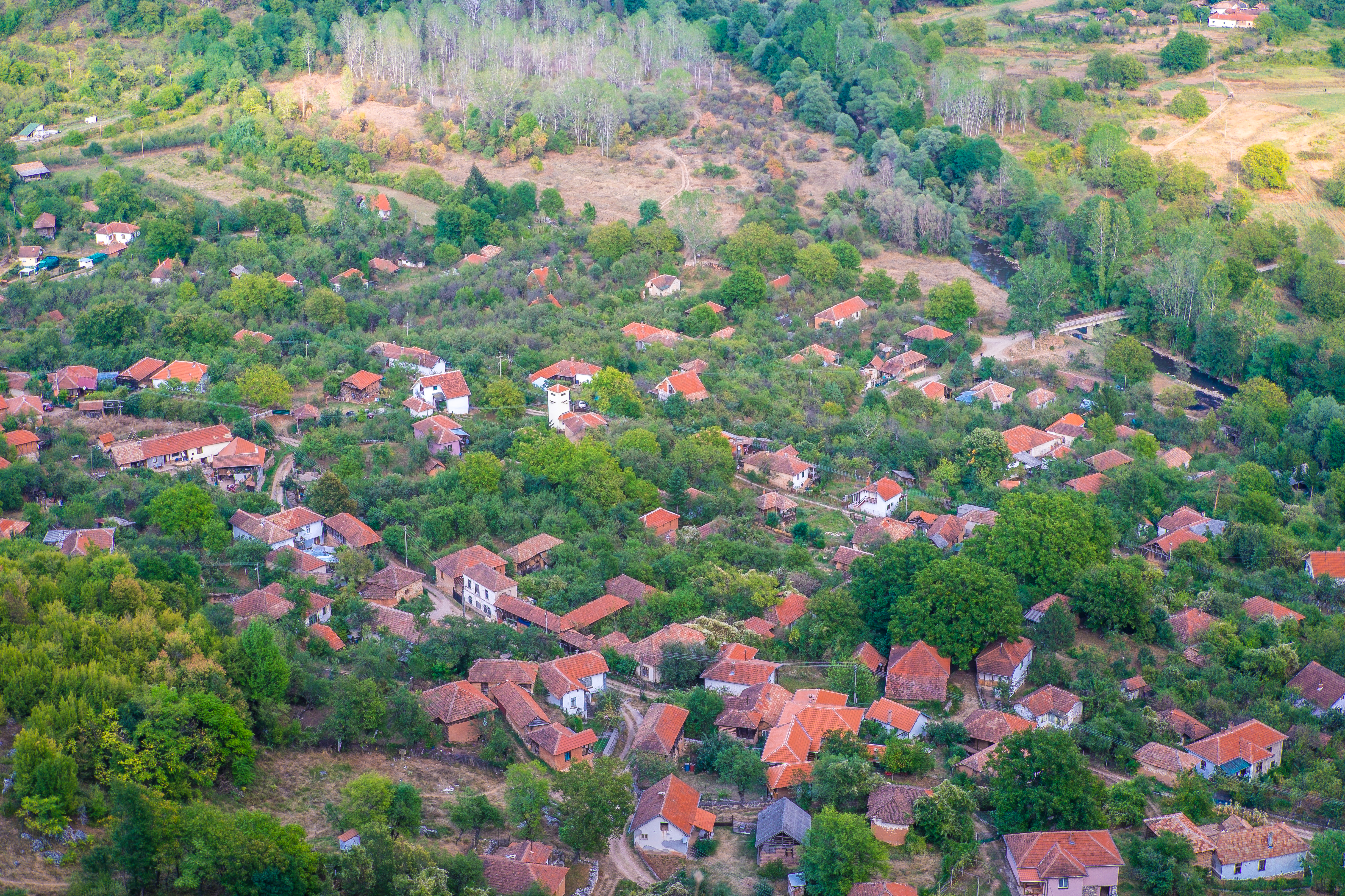 Selo Vlasi